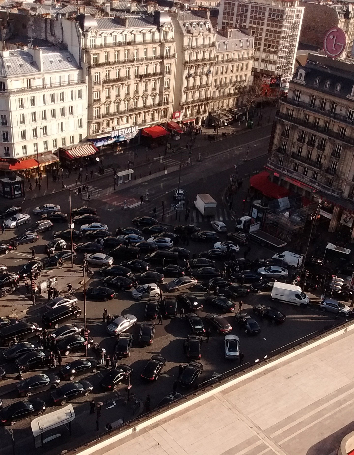 Uber drivers on strike at Montparnasse, Paris.